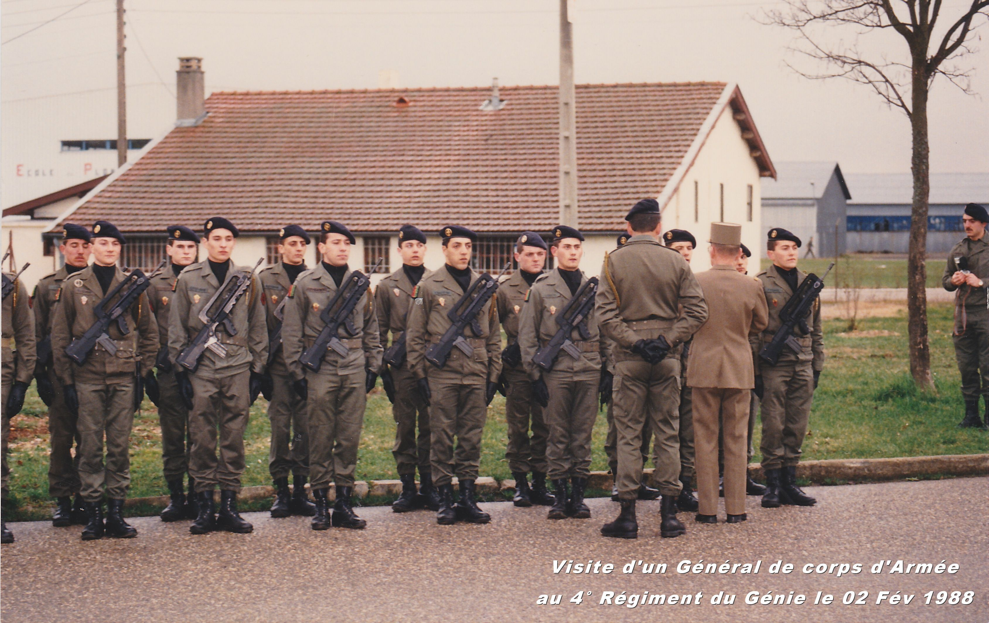 Visite d'un Général de corps d'Armée le 02.Fév.1988